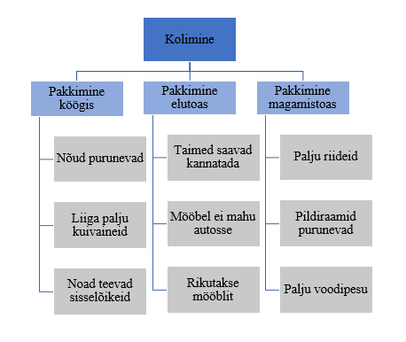 RBS näidis kolimisprojektina